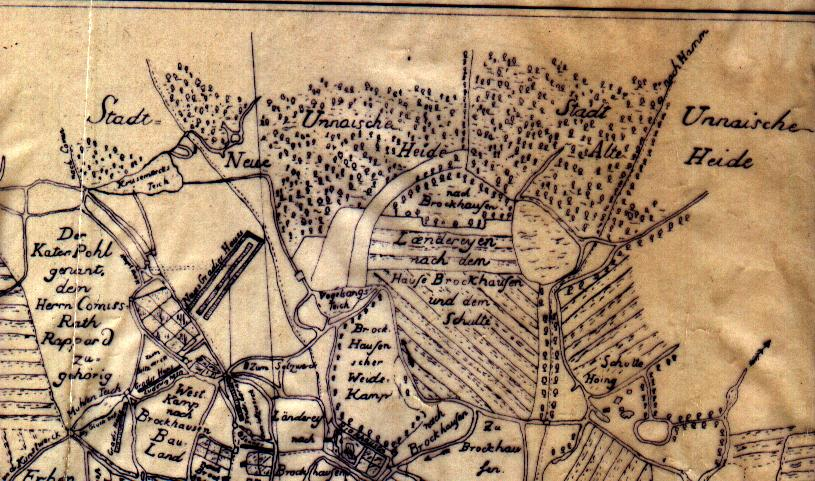 Kartenausschnitt Alte Heide 1780